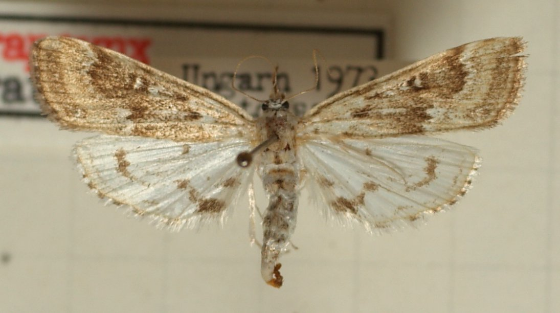 Paraponyx strationata